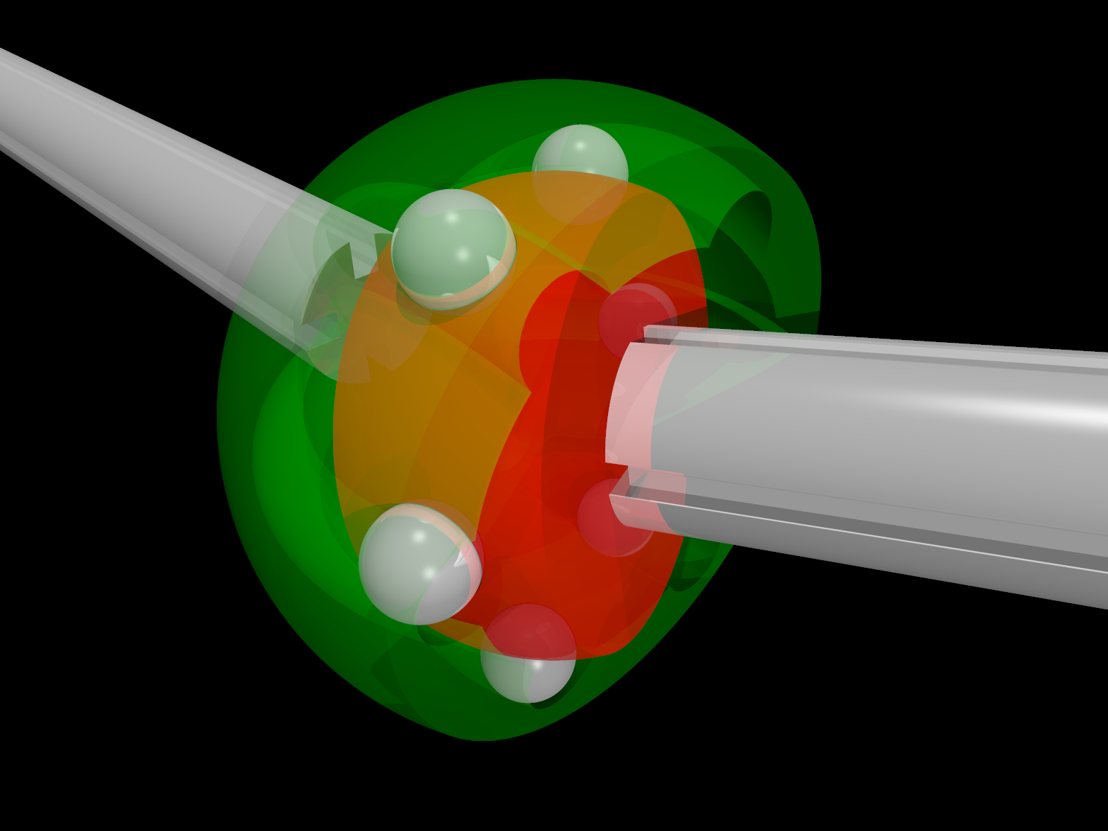 povray +Icv_joint.pov +Ocv_joint_large.png +Q9 +A0.2 -D -J +W1600 +H120